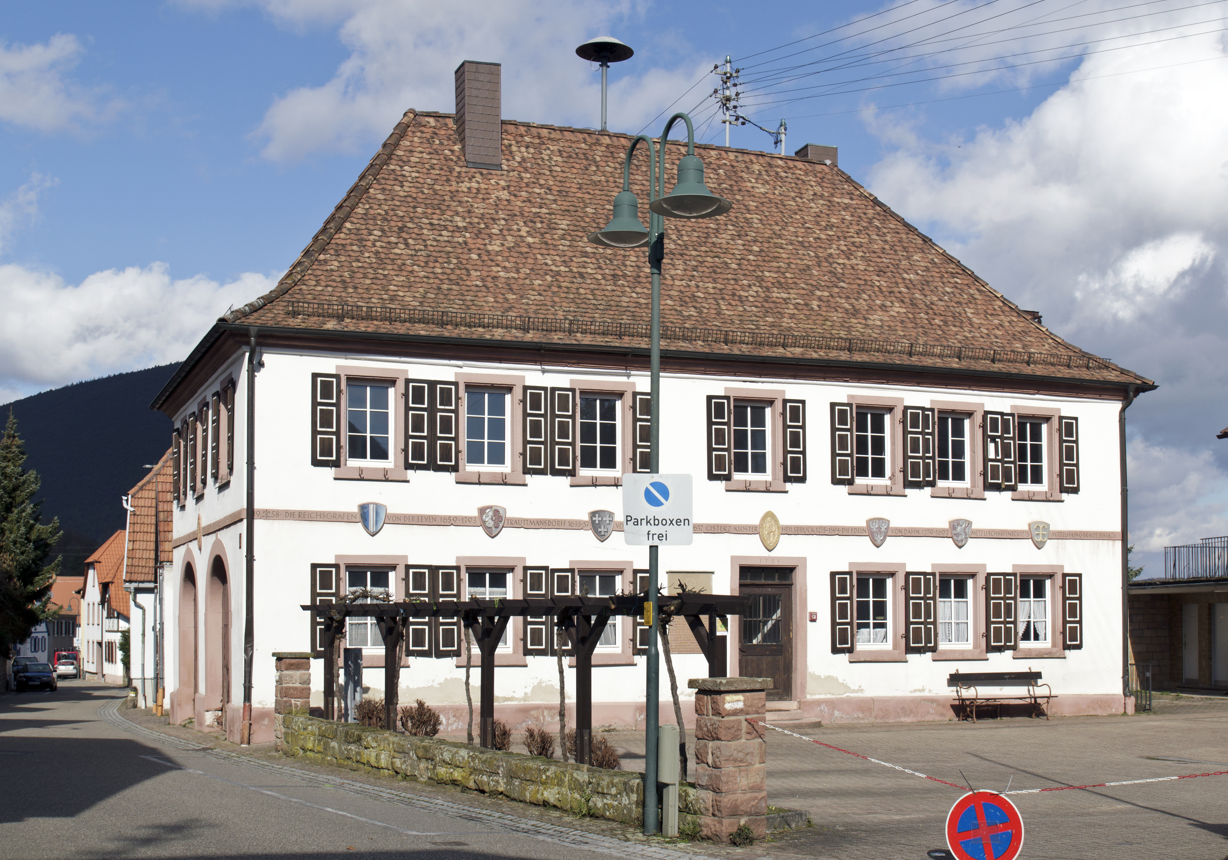 Burrweiler, Rathaus, barocker Walmdachbau, bezeichnet 1751